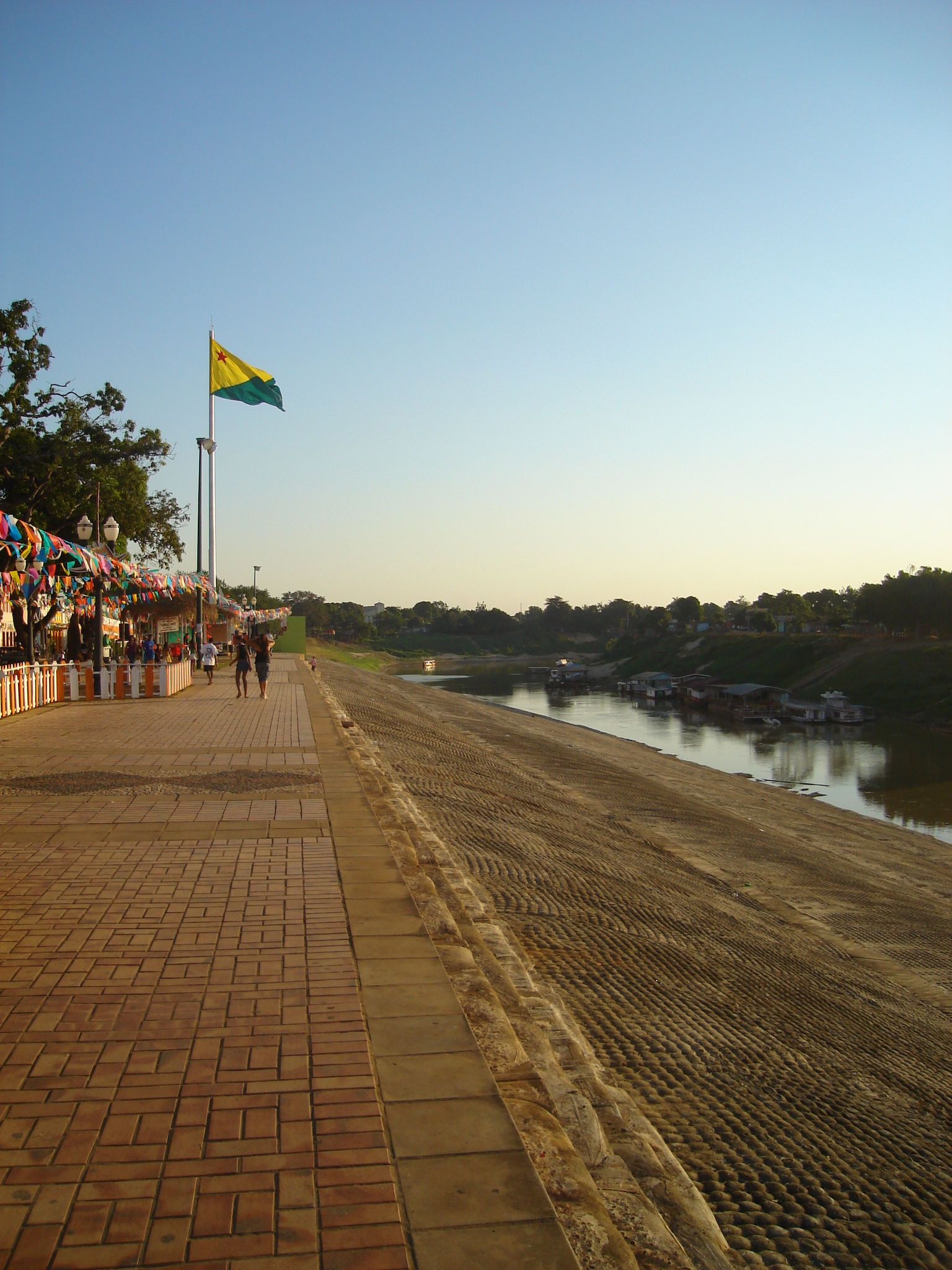 River Acre at Rio Branco, Acre, Brazil